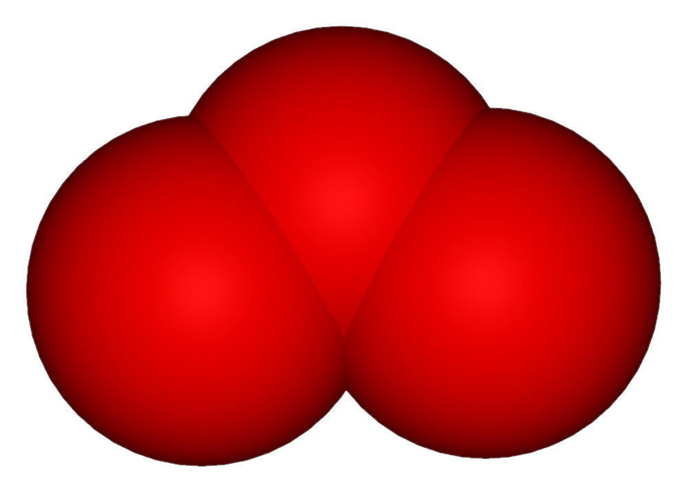 Ozone-3D-space-filling